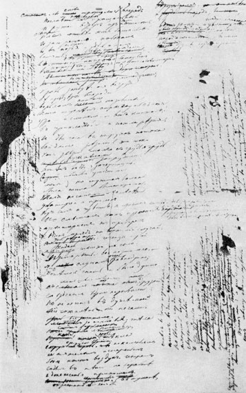 Автограф стихотворения Лермонтова «Валерик» ("Я к вам пишу случайно, — право...")